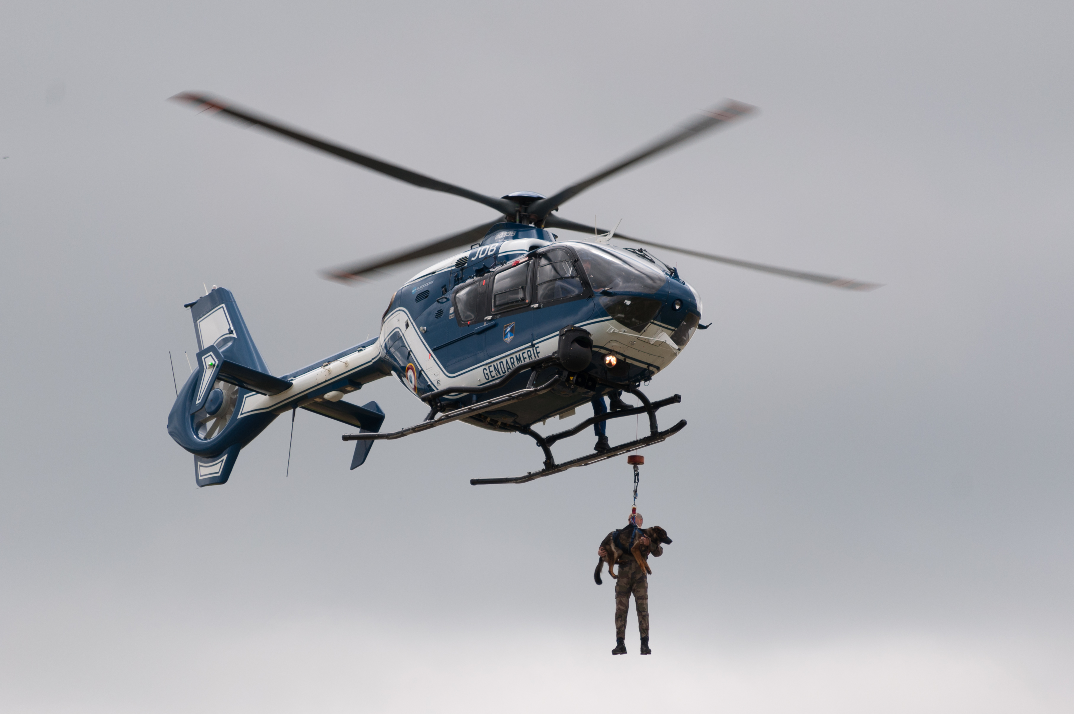 AirExpo 2014 - Gendarmerie